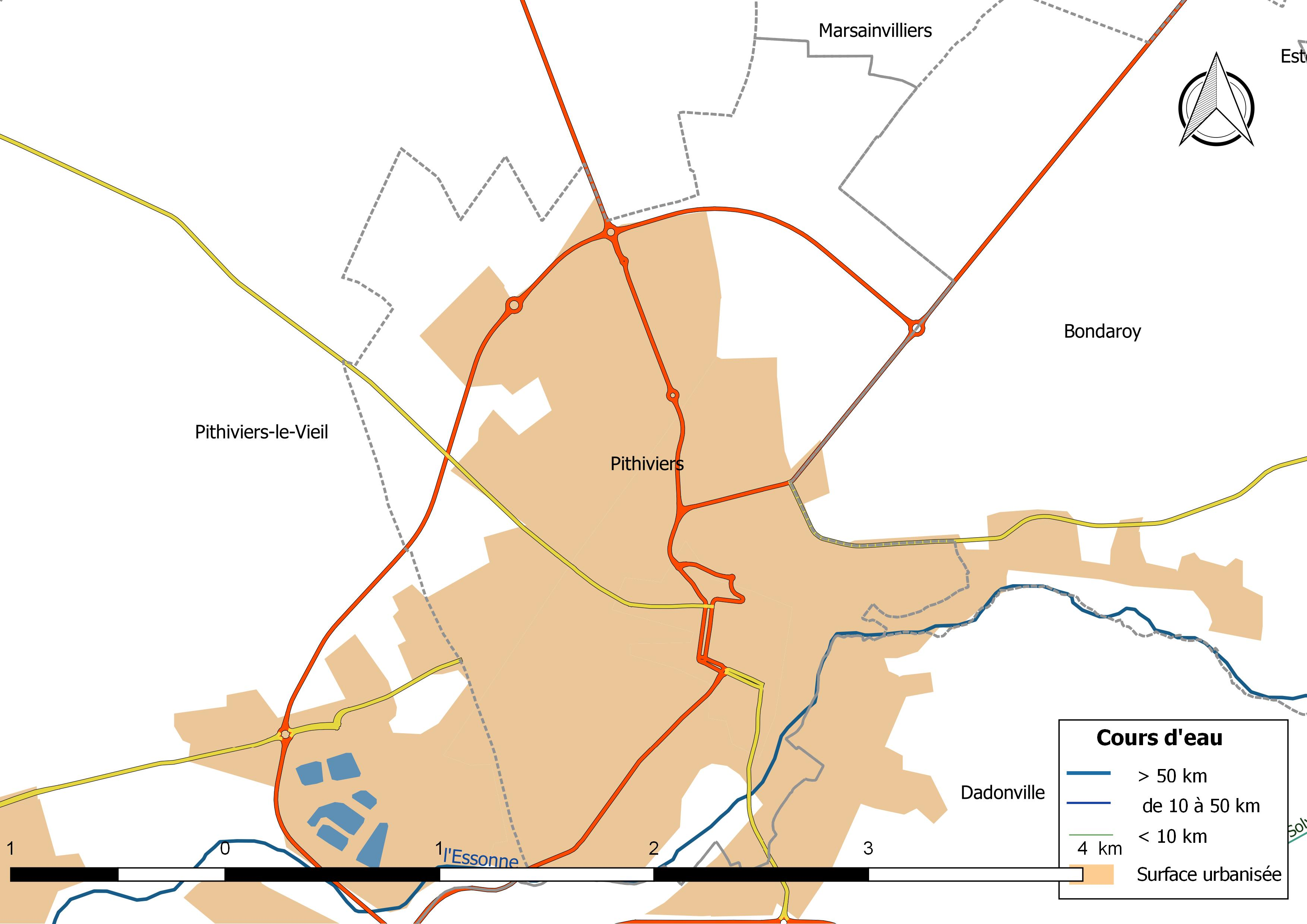 Carte du réseau hydrographique de la commune de Pithiviers (France).